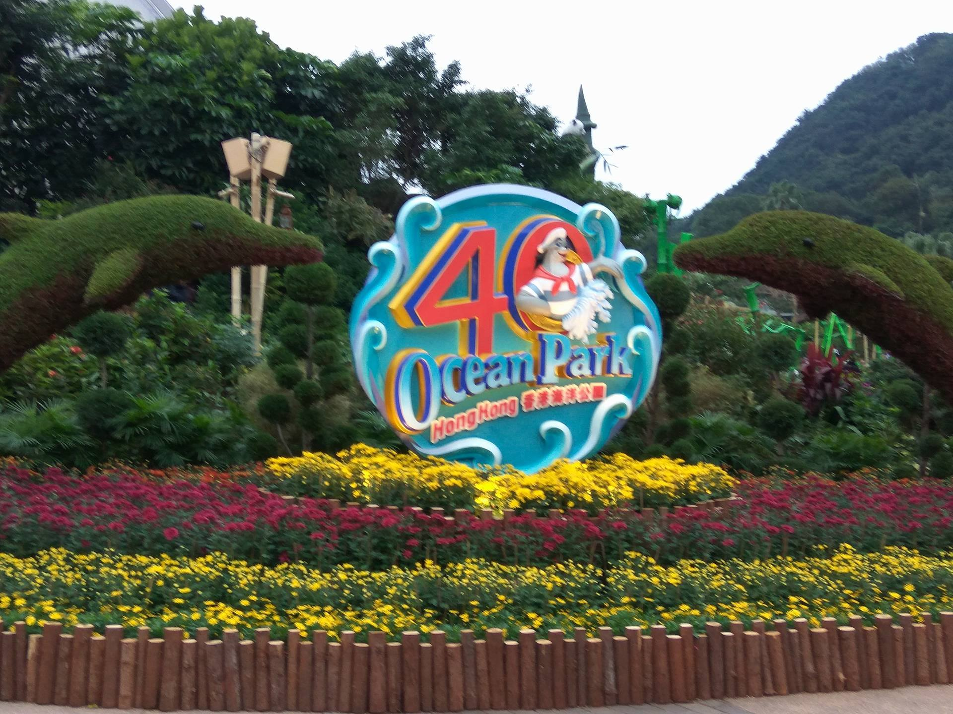 香港海洋公園40週年標誌雕塑